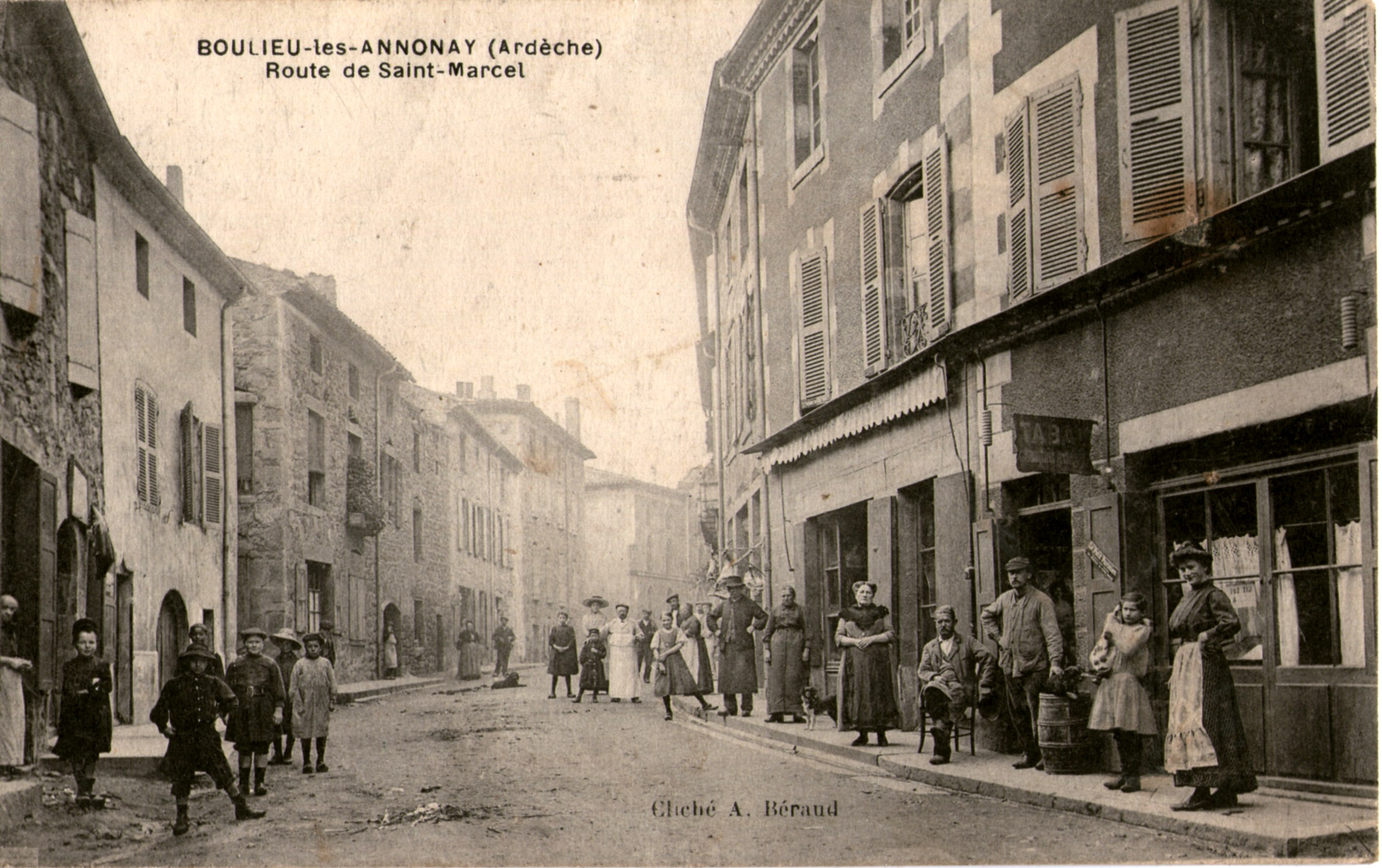 Boulieu rue